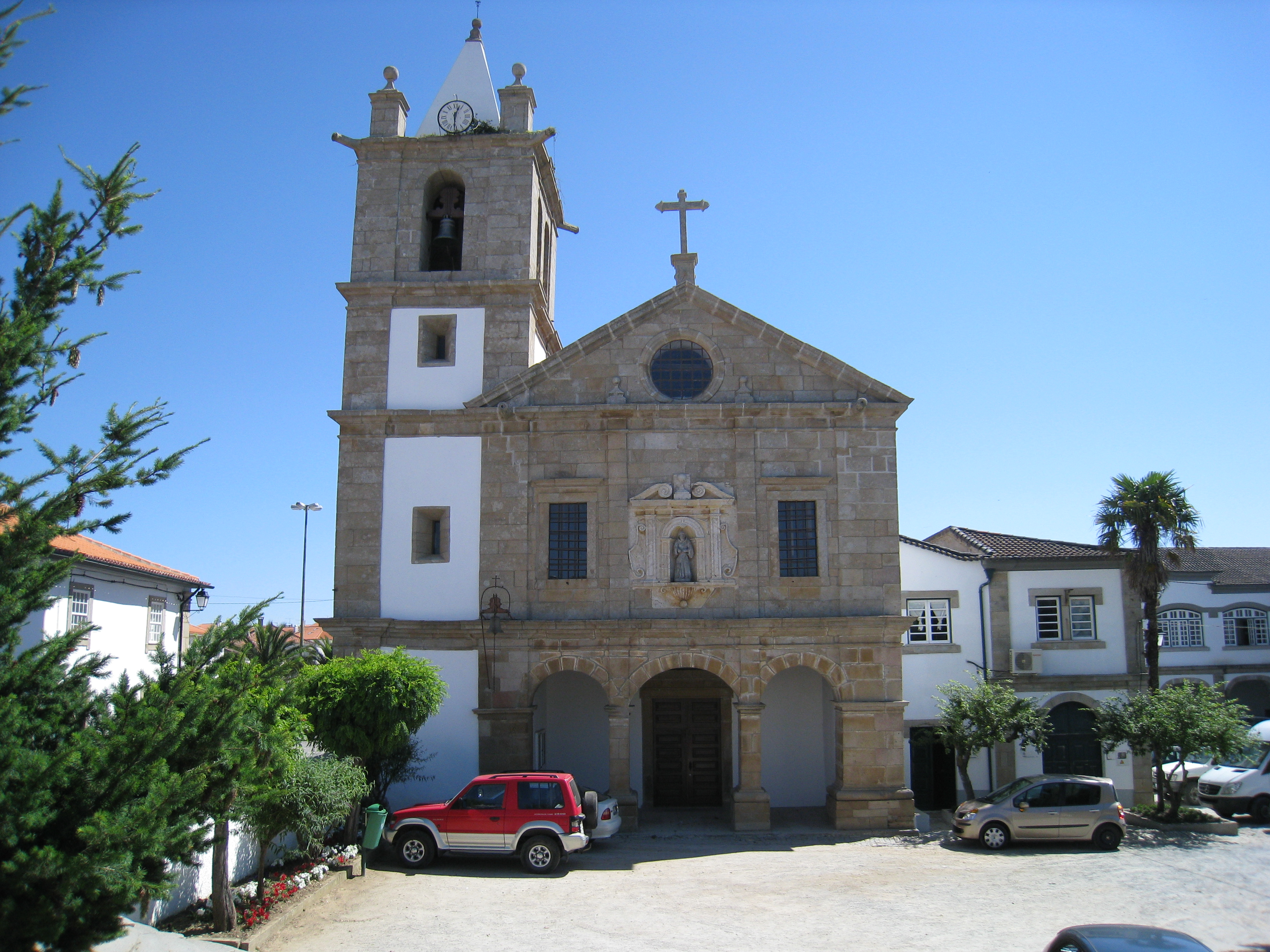 Mogadouro